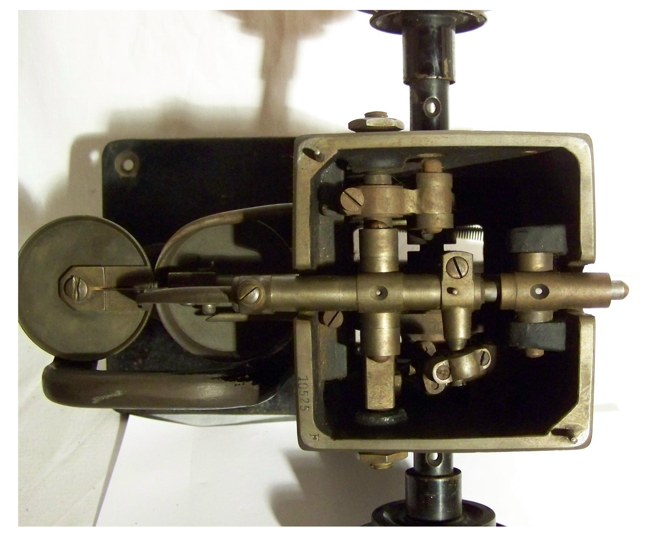 Alte Pelznähmaschine der Firma Rittershausen, Berlin, Marcusstraße 3.